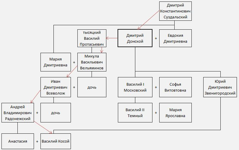 Пояс Дмитрия Донского и его наследование